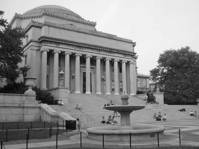 Columbia Universität, Low Library